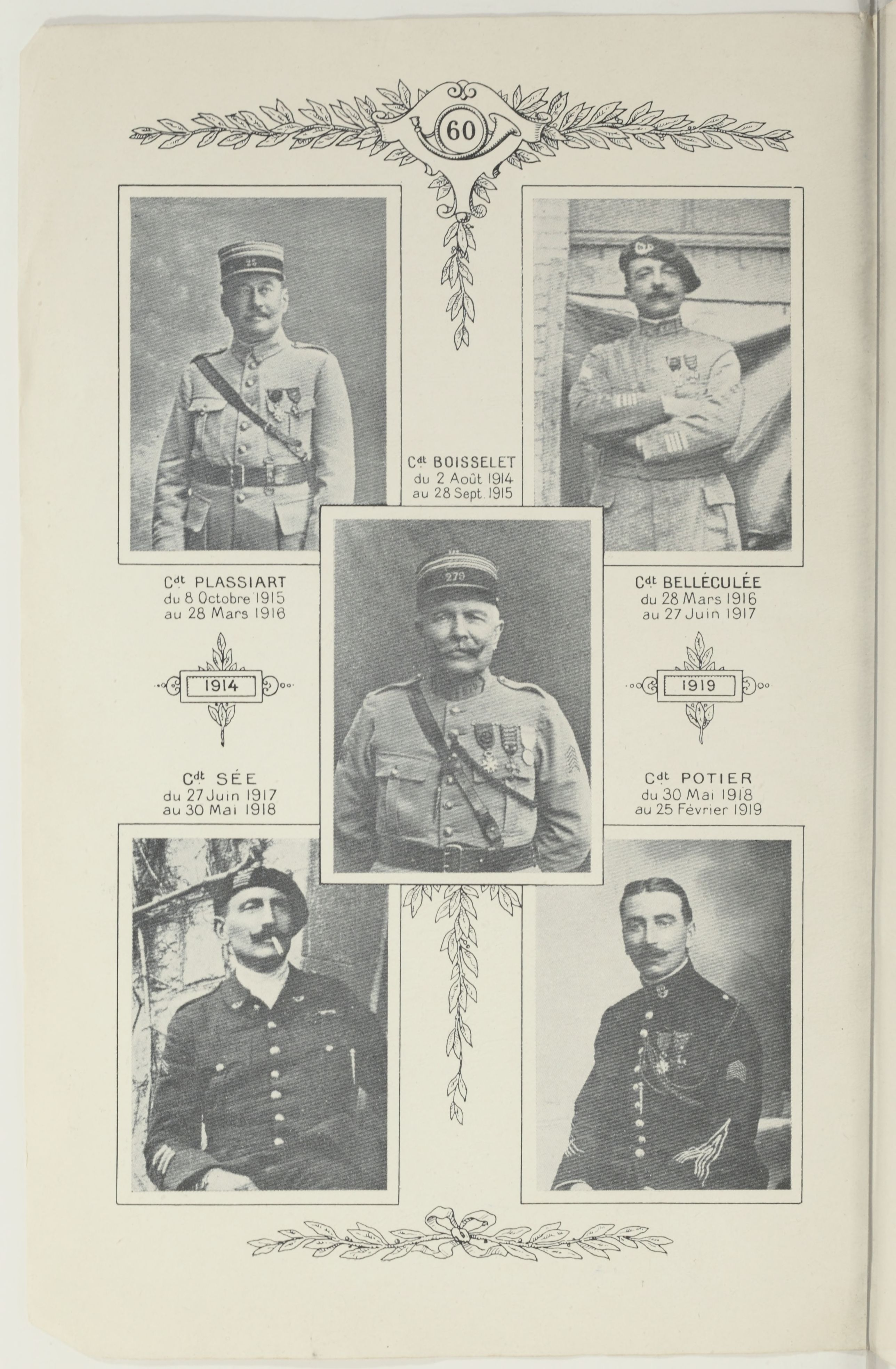 Photographies des commandants du 60e bataillon de chasseurs à pied, extrait de l'historique & livre d'or, août 1914-février 1919 par le capitaine Antiglio